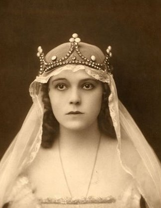 Voinovich Géza: Mohács. Nemzeti Színház. Bemutató: 1922-01-18. Rendező: Hevesi Sándor. Mária királyné: Bajor Gizi.